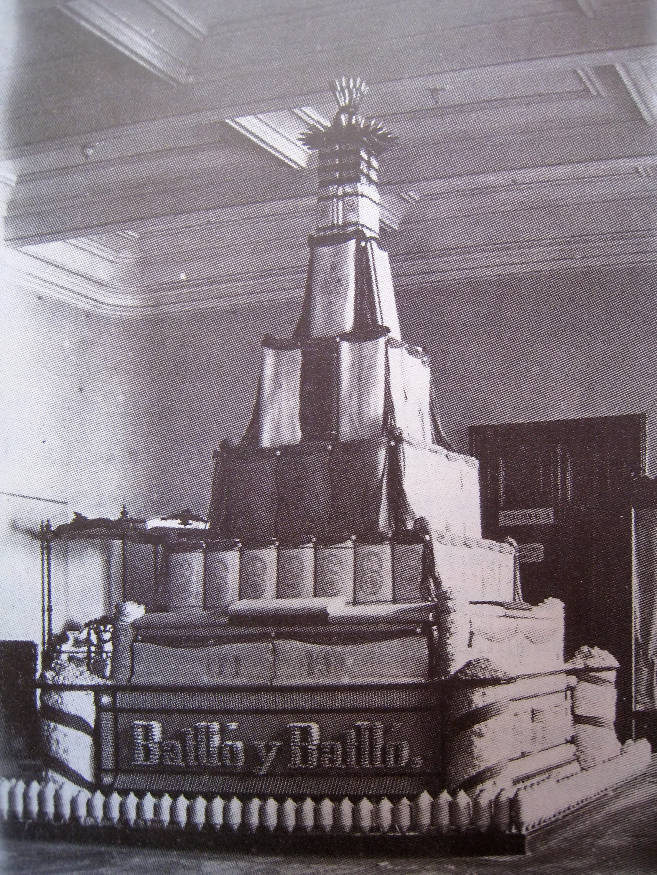 Expositor de l'empresa "tèxtil Batlló i Batlló" de Barcelona (Catalunya), utilitzat a la "Manifestació Catalana de 1877". Era obra del taller dels moblistes Busquets